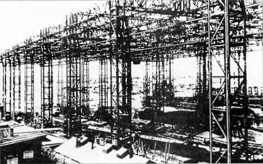 Лидеры эскадренных миноносцев проекта 48 на стапеле завода № 198 в Николаеве, 1939 год.